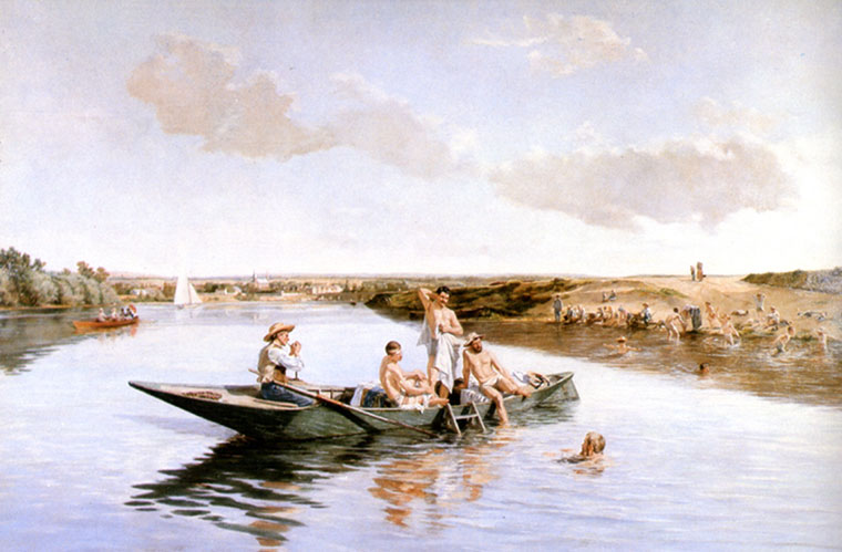 L'été ou la Baignade